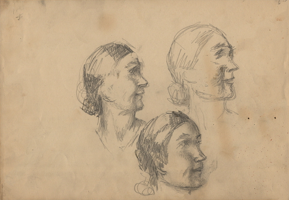 Кузьма Петров-Водкин (1878-1939). Женские головы. Этюды к картине "Новоселье". Набросок. РГАЛИ, ф. 2010 оп. 1 ед. хр. 92 л. 6 (об).